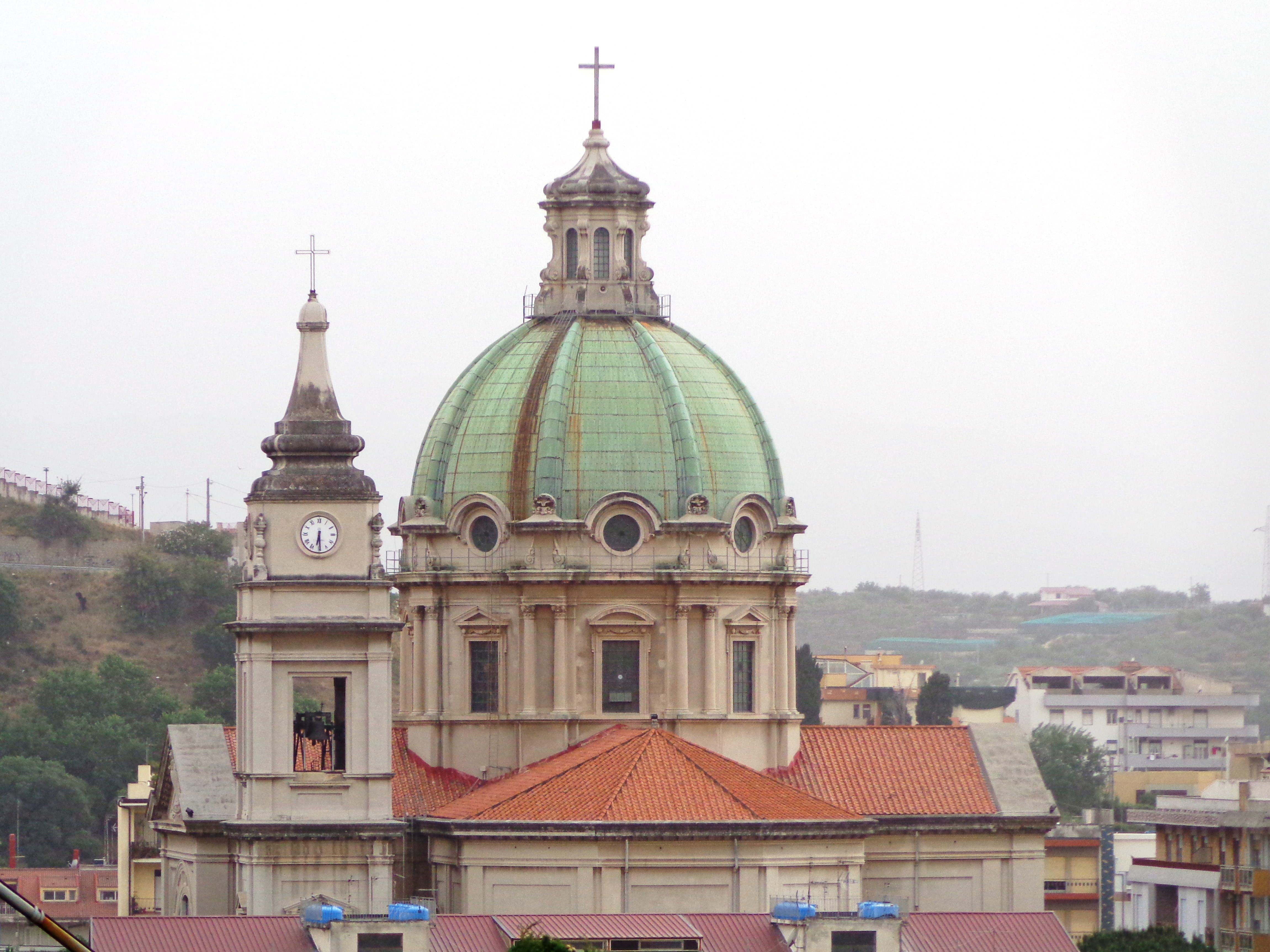 Basilica Minore di San Sebastiano Barcellona Pozzo di Gotto, Panorama dai Cappuccini.